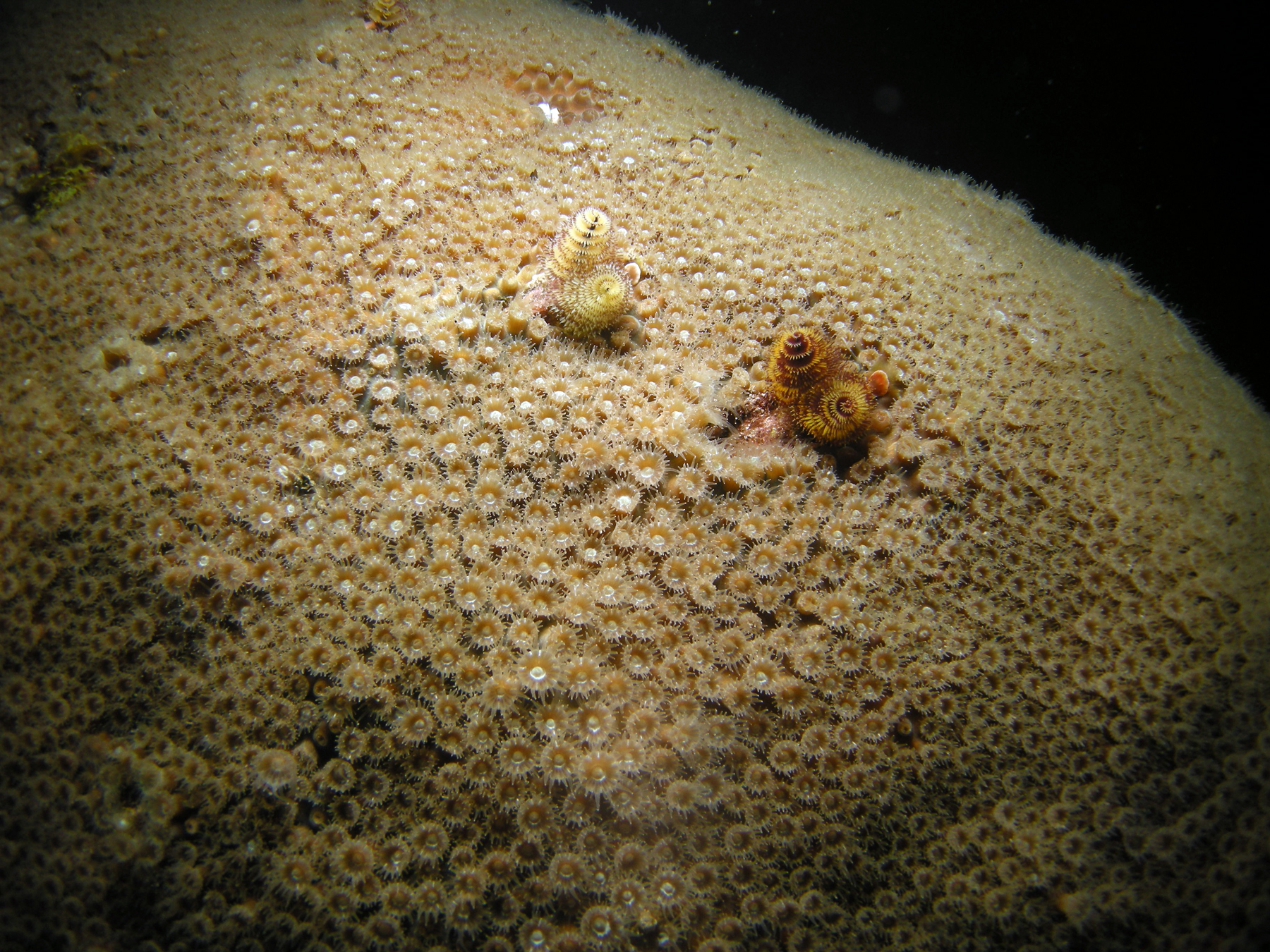 Montastraea cavernosa, con pólipos expandidos, y Spirobranchus giganteus. Flower Garden Banks, EE.UU.